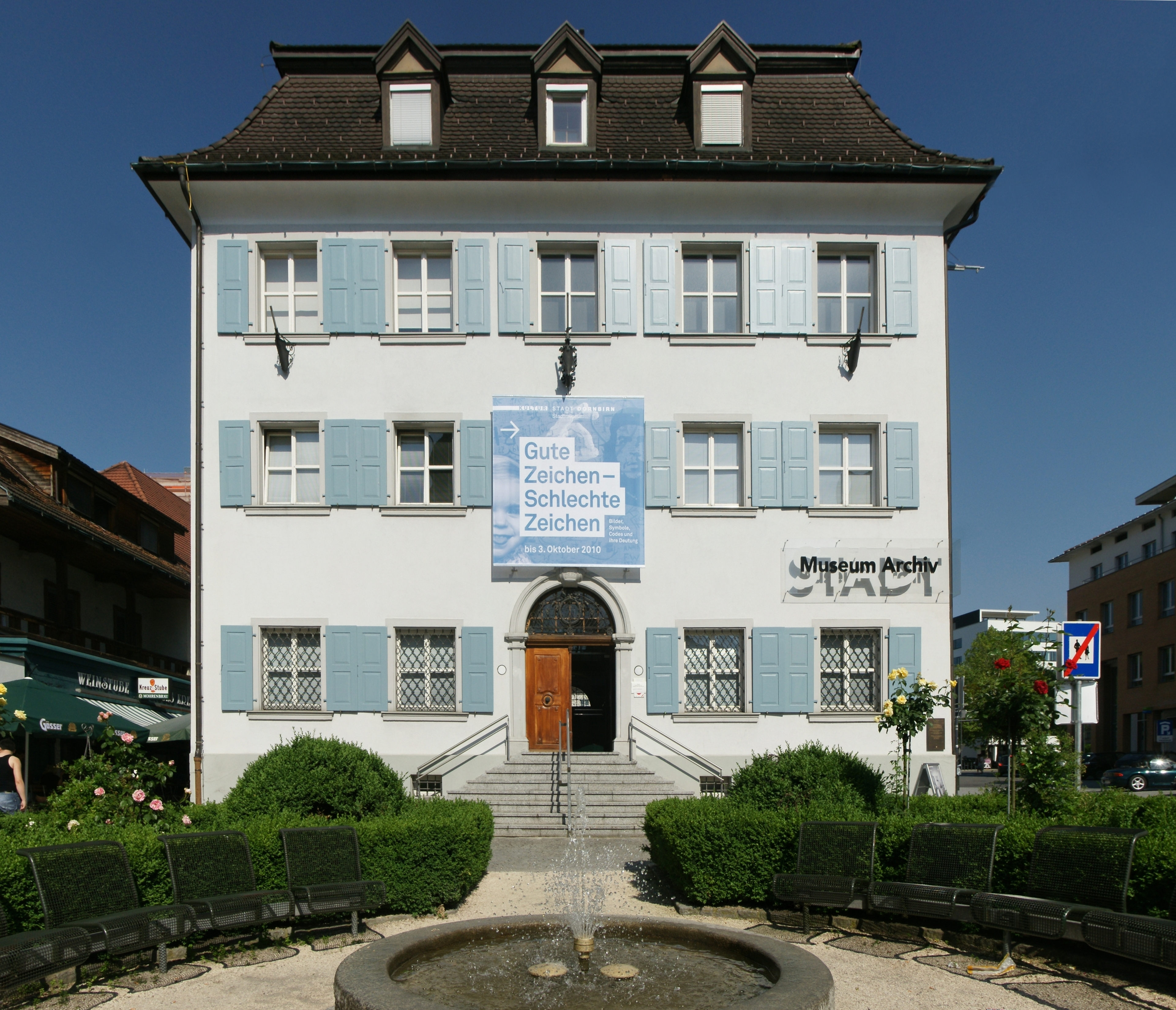 aus dem DEHIO Vorarlberg 1983: (Dornbirn ) Marktplatz Nr.11: Sogenanntes "Lorenz-Rhomberg-Haus", erbaut 1796; kubischer Baukörper, 3geschossig, allseitig 5achsig, Mansardwalmdach; erhöhter Eingang mit mittelachsigem Flur, sandsteingerahmtes Portal bezeichnet 1796, originales Lunettengitter, Türflügel; ebenerdig Klostergitter in den Fenstern. Heute Museum und Archiv der Stadt Dornbirn